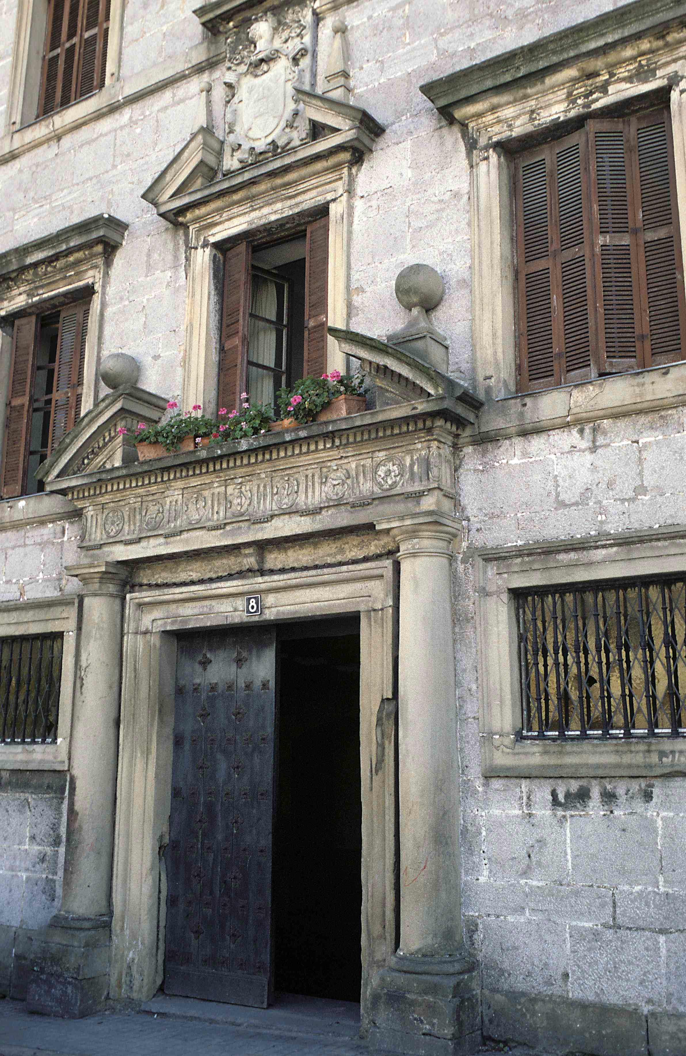 Palacio de Arbelaiz, en Irún (Guipúzcoa). Portal y escudo de los Arbelaiz.